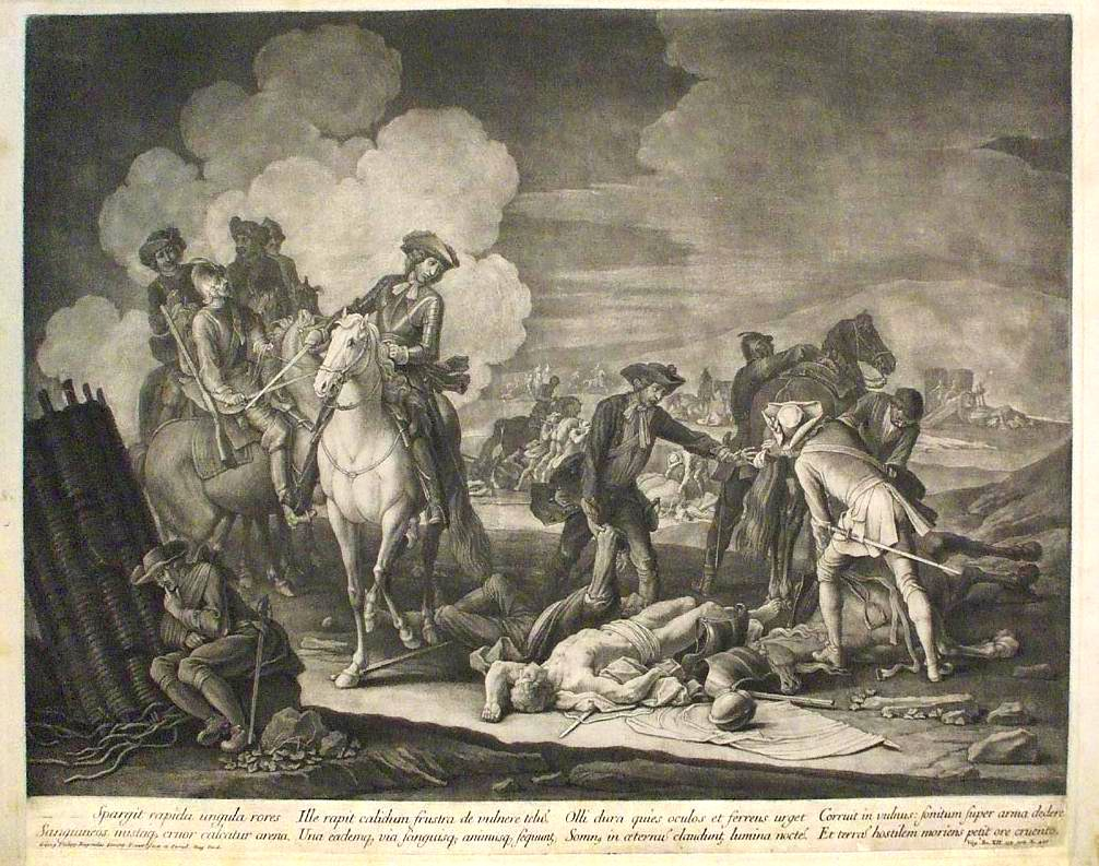 Császári lovasok csata után